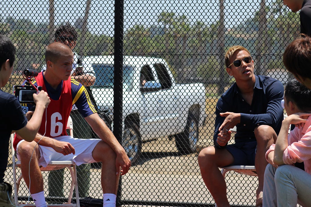 エリックと本田氏のインタビュー